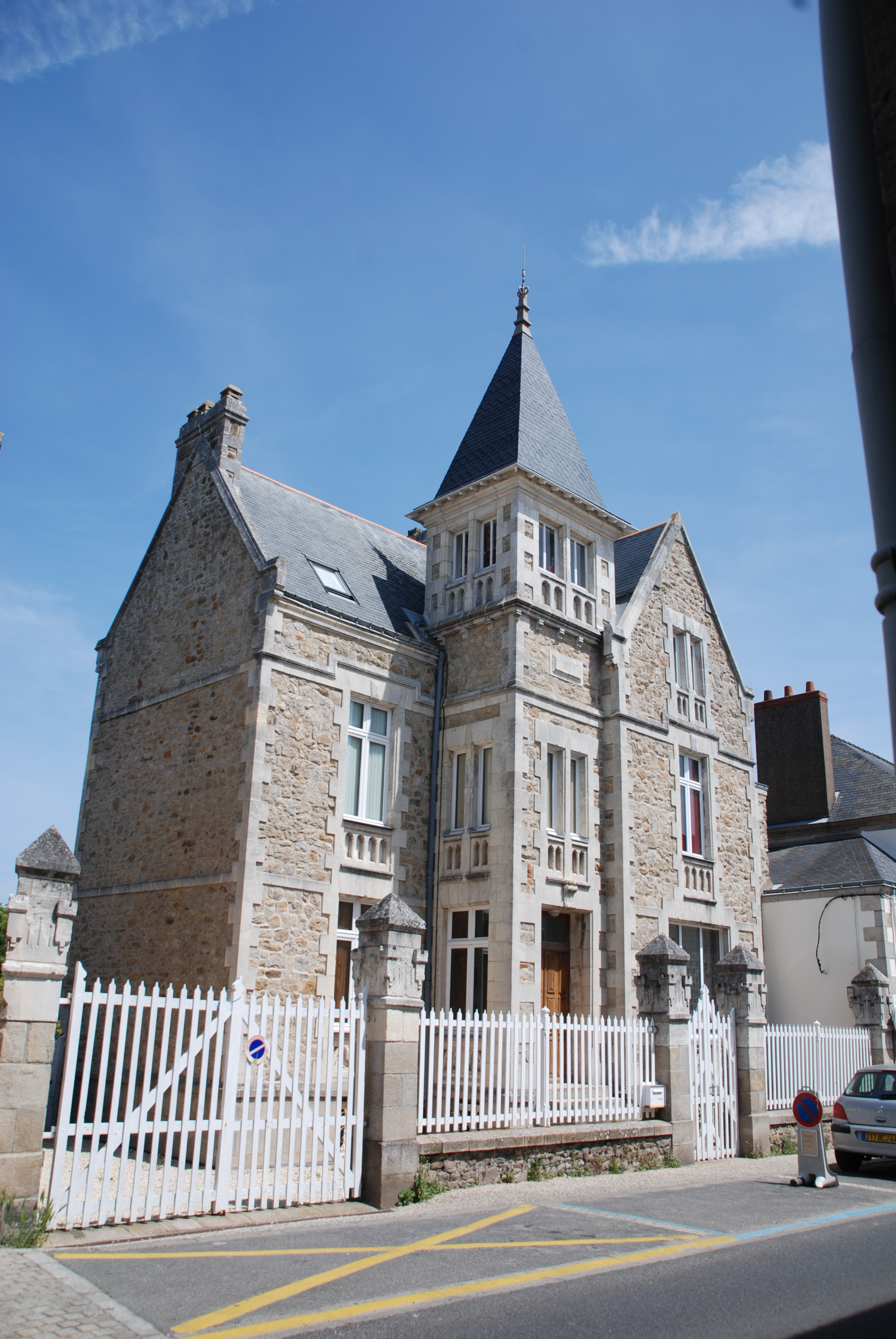 Batz-sur-Mer - La villa le Château